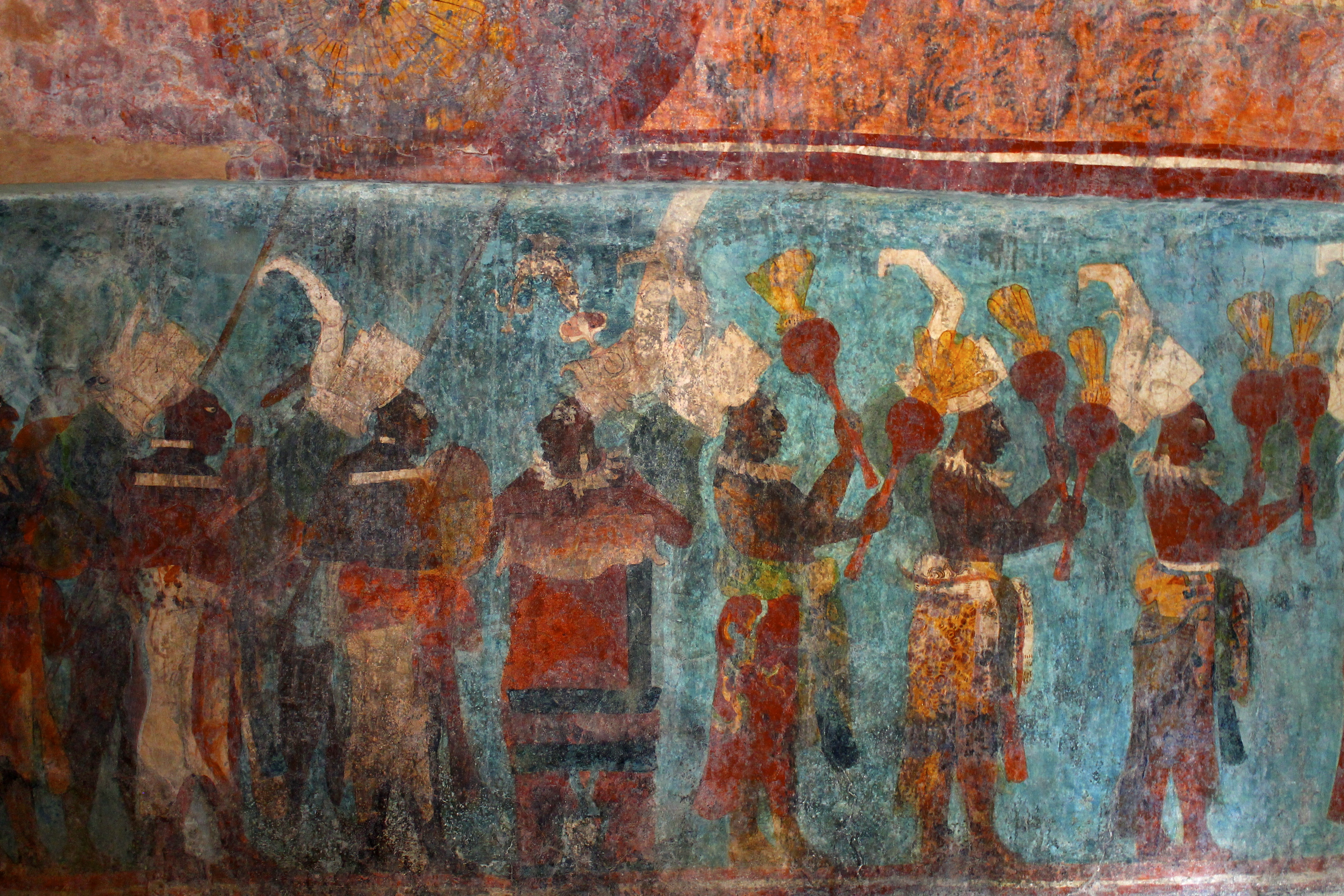 Pinturas ancestrales en mítica zona arqueológica de Bonampak, Chiapas.